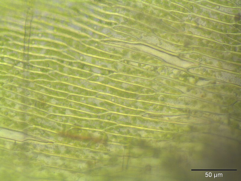 Rotstängelmoos (Pleurozium schreberi), Laminazellen, 400x vergrößert